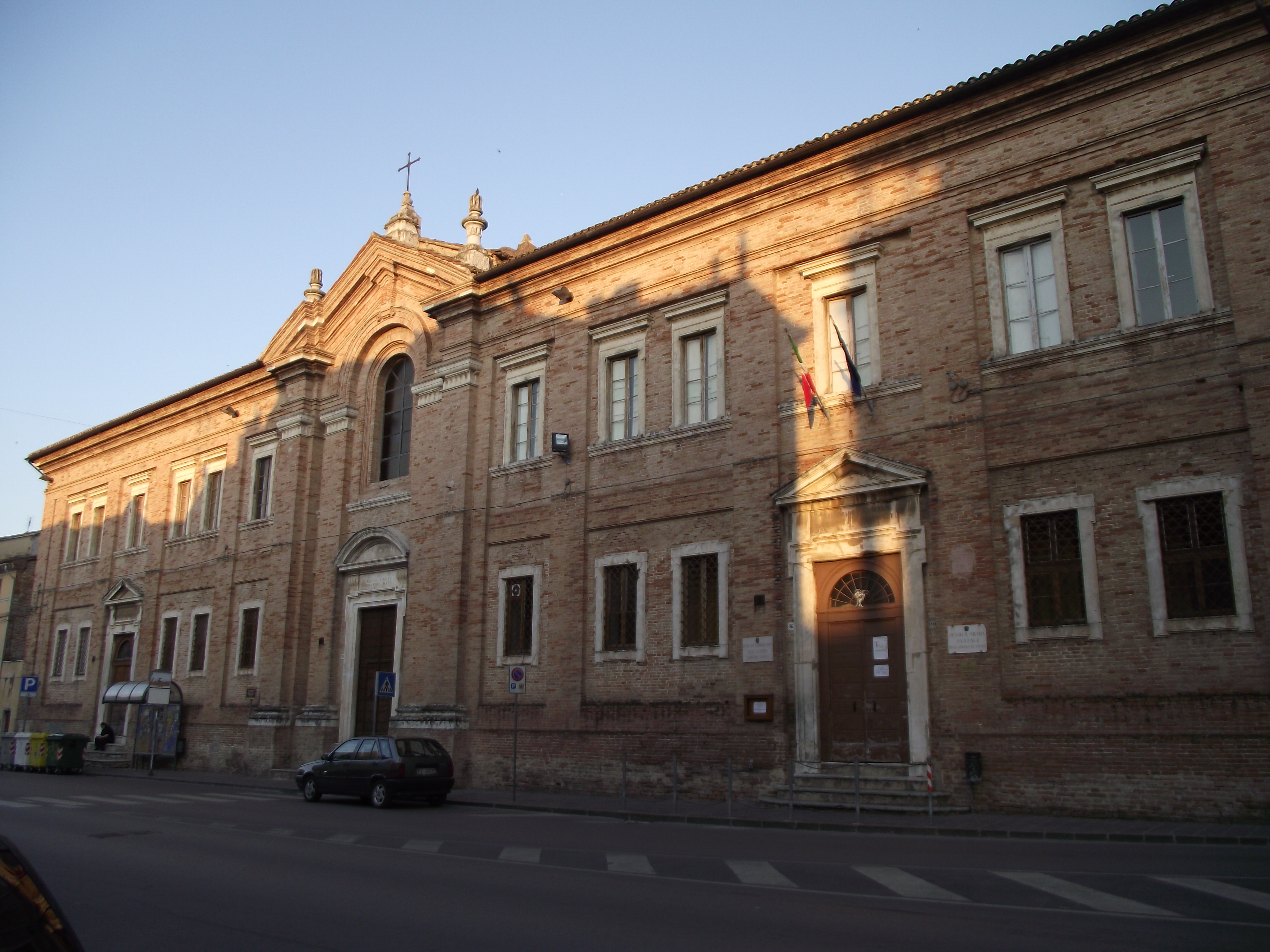 Orfanotrofio femminile, 1771-75